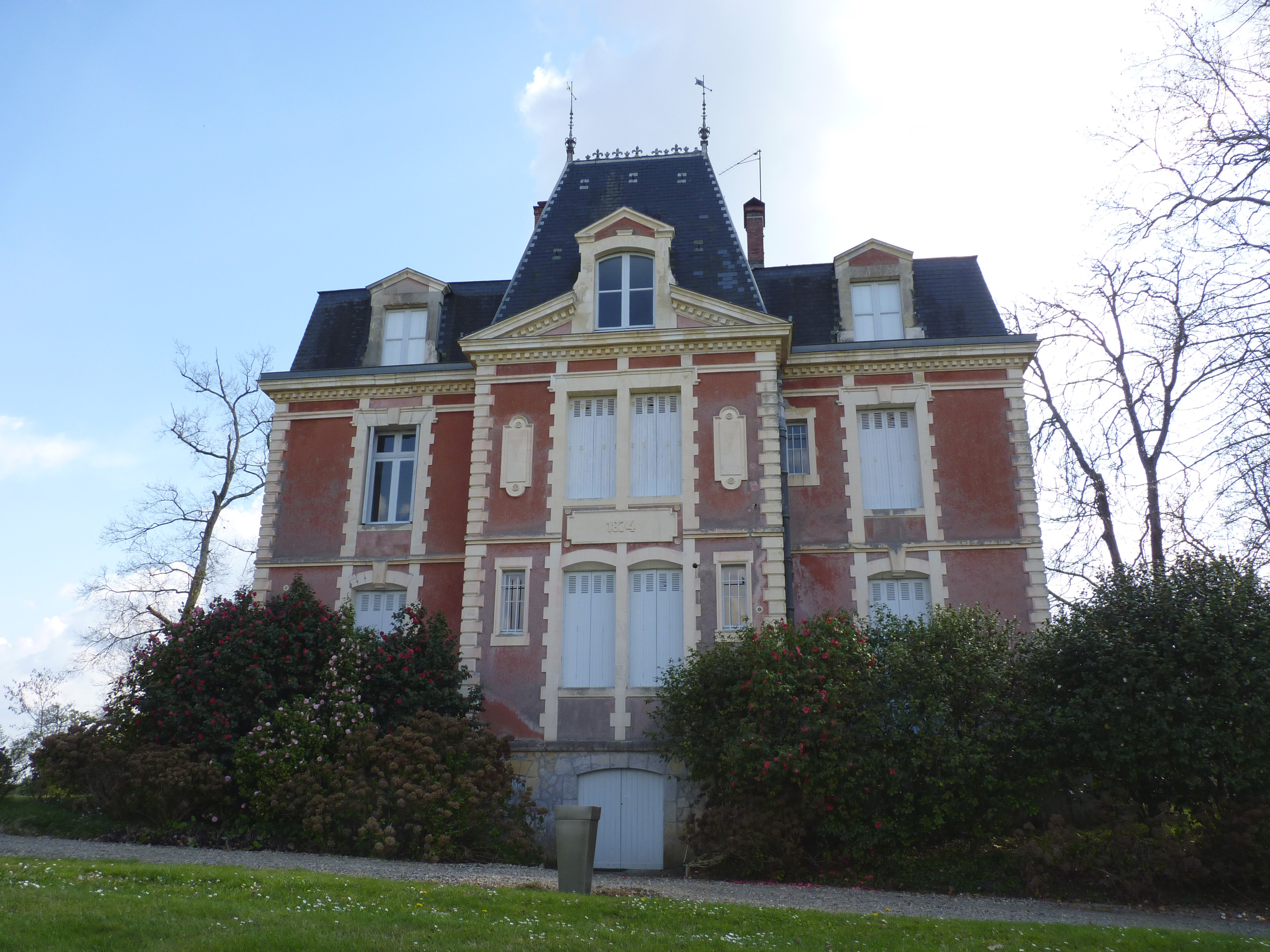 Le château de Lahosse